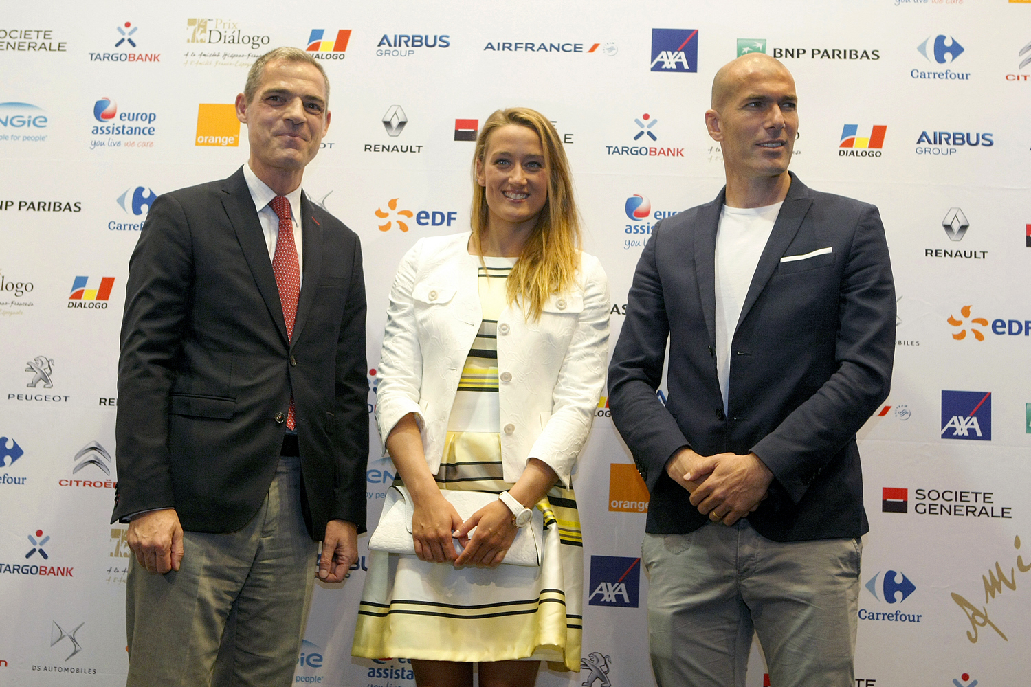 Rueda de prensa del XII Prix Diálogo concedido a Zinedine Zidane y Mireia Belmonte.